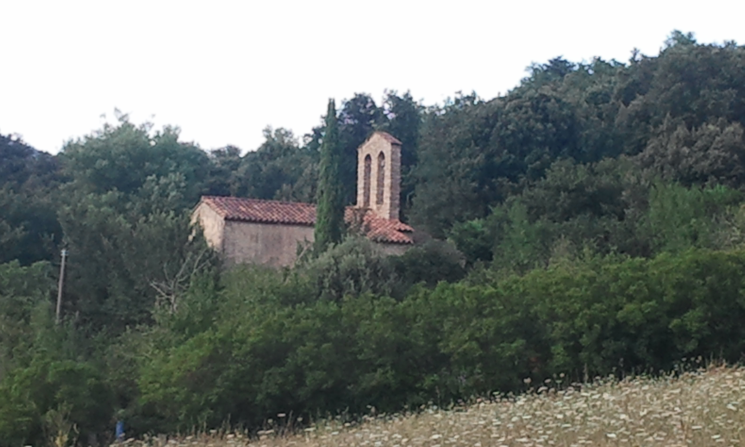 Eglise Santa Creu de Fontanils